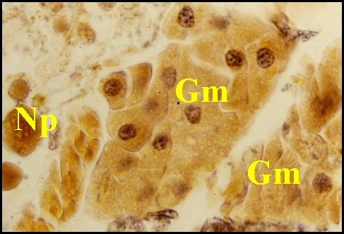 Groupements cellulaires de la glande de mue dans le prosoma de Mastophora cornigera